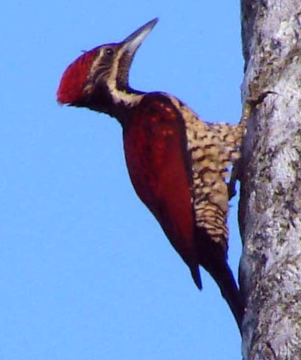 A male Red-backed flameback (Dinopium benghalense psarodes) from Sri Lanka